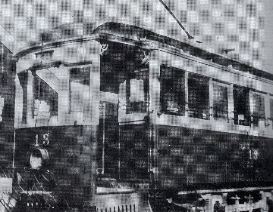 名鉄13号。戦災で焼失し、戦後モ50形として車体を新製する。